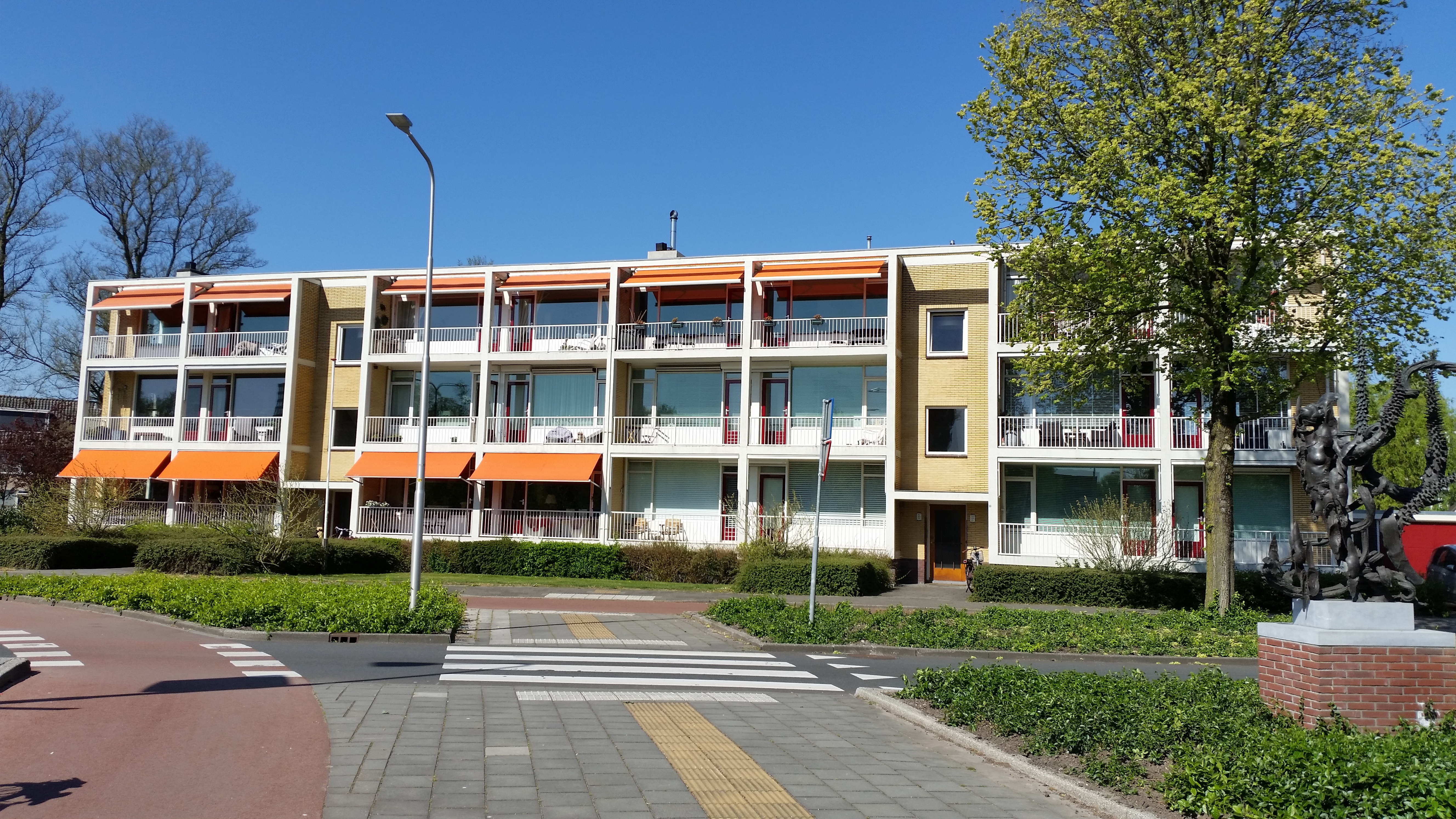 Gecombineerd gemeentelijk monument aan de Keizer Karelweg, Amstelveen. Rechts het beeld Windbloemig (april 2020)